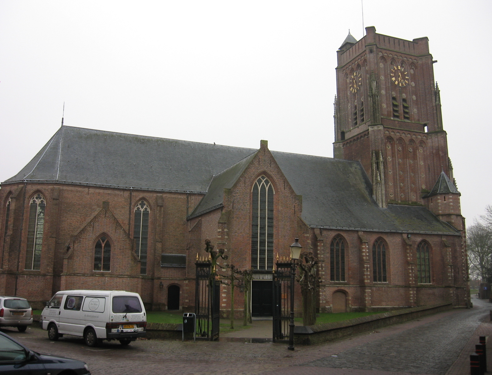 Zicht op een deel van de Martinuskerk, Kerkstraat 35 in Woudrichem